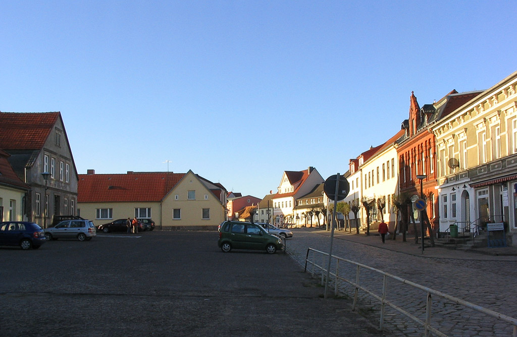 Beschreibung: Marktplatz / Ortsmitte von Franzburg / direkt vor dem Rathaus Fotograf: Darkone, 21. Oktober 2004